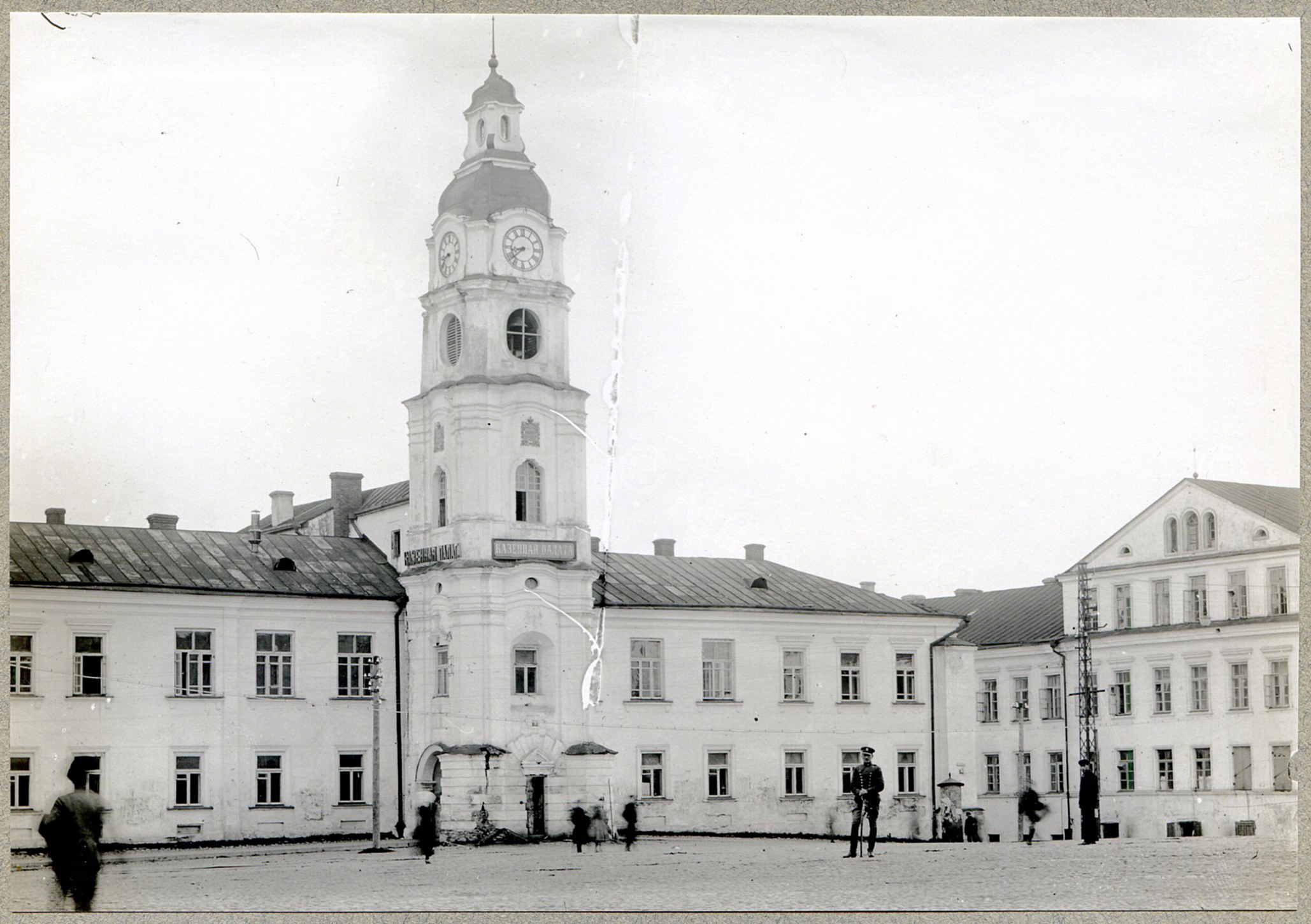 Беларуская (тарашкевіца): Менск (Miensk), рог Высокага Рынку (Vysoki Rynak) і вуліцы Койданаўскай (vulica Kojdanaŭskaja). Езуіцкі калегіюм